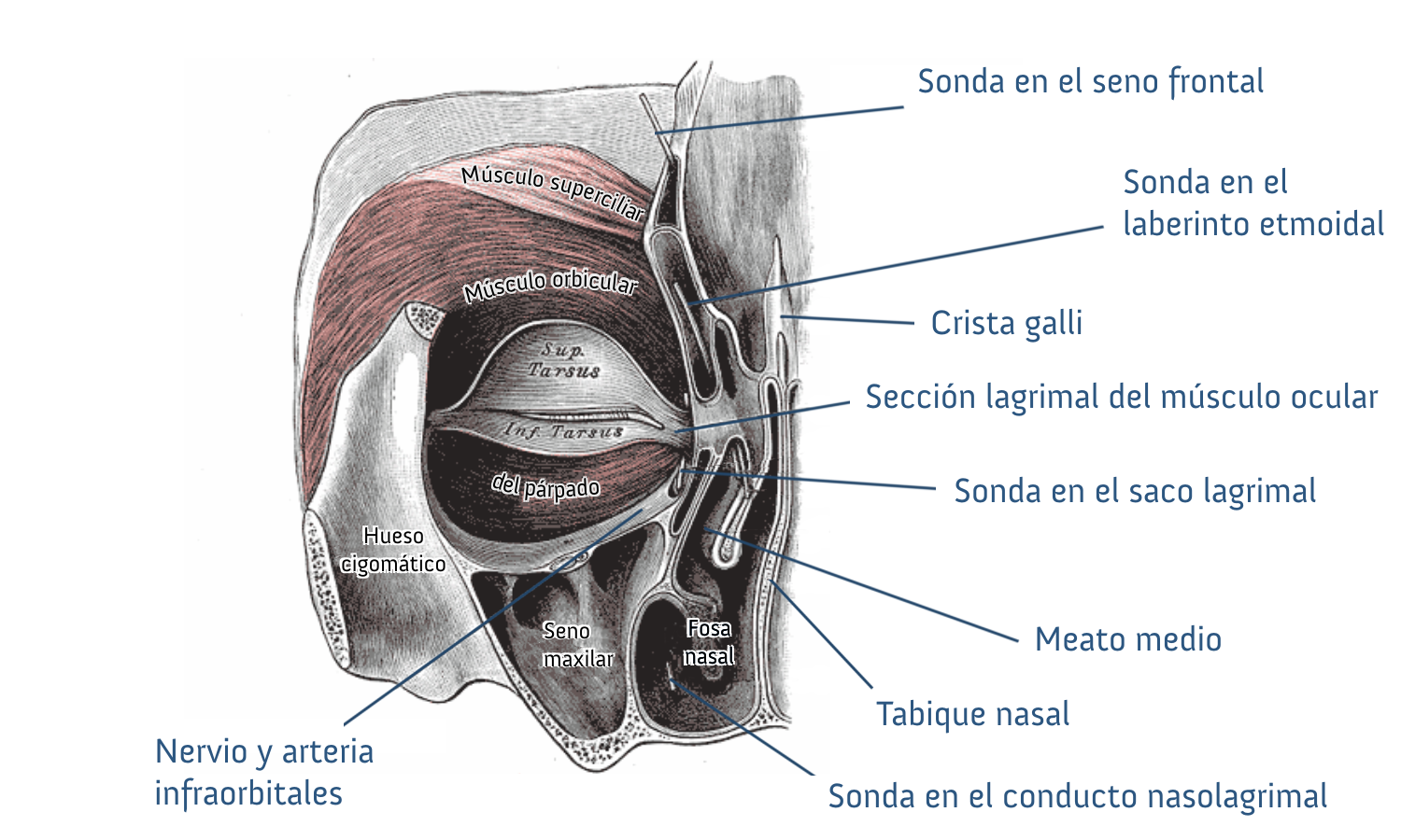 Frontalschnitt durch den Kopf, Sicht von dorsal. Darstellung der Orbita nach Entfernung des Corpus adiposum, Glandula lacrimalis, des Auges und seiner Muskeln. Sicht auf Mm. Tarsales inf. et sup., sowie M. Orbicularis. Darstellung des Sinus maxillaris und frontalis, sowie der Nasenhöhle und Cellulae ethmoidales sup. Sondengängige Verbindungen der Nasenhöhlen durch Hiatus semilunaris . Ebenfalls gezeigt, der Ductus nasolacrimalis.